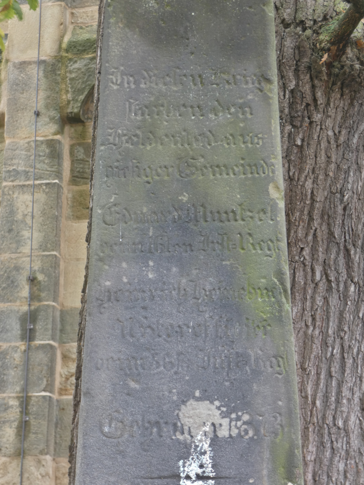 Inschrift auf der Nordseite des Kriegerdenkmals in Gehrden